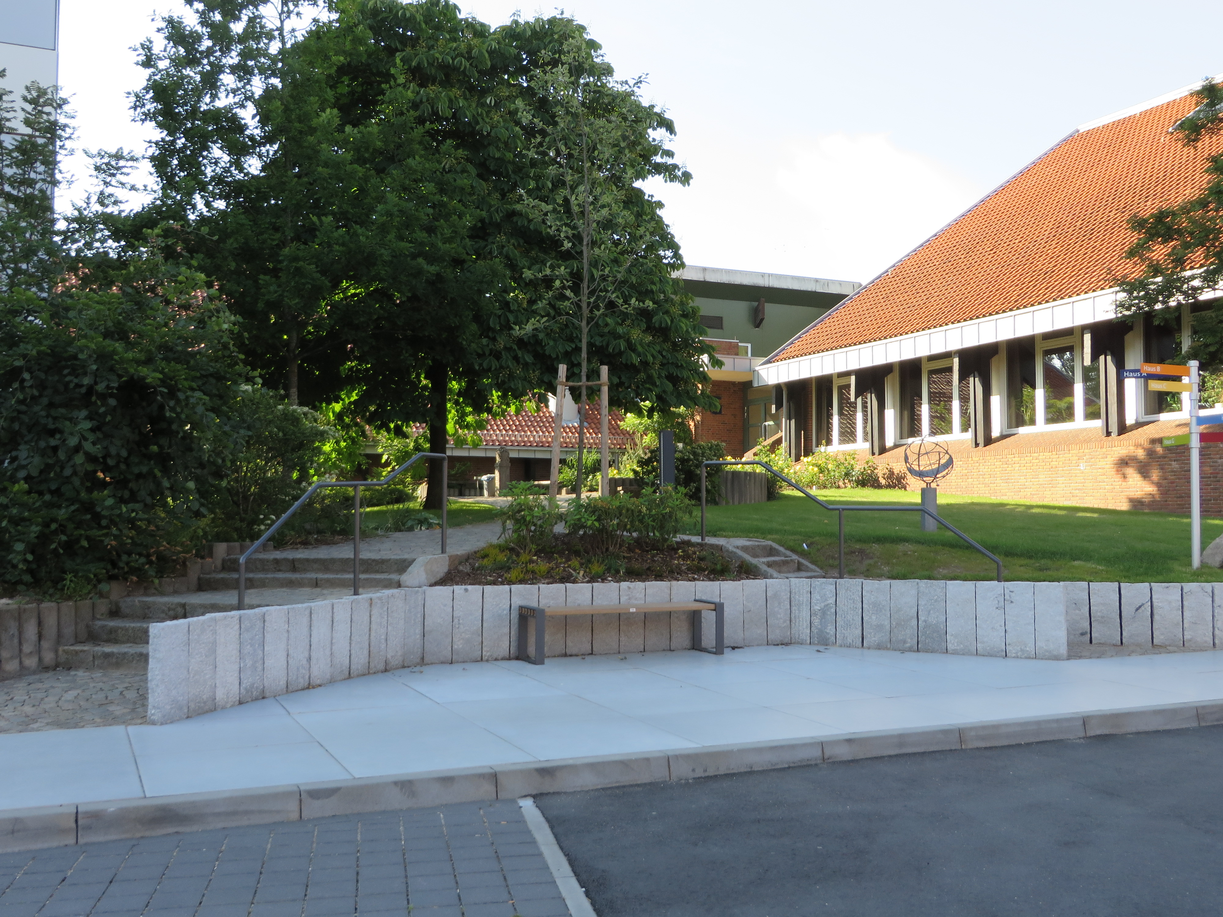 Burghügel beim Dammhofareal (Flensburg Mai 2014), Bild 05